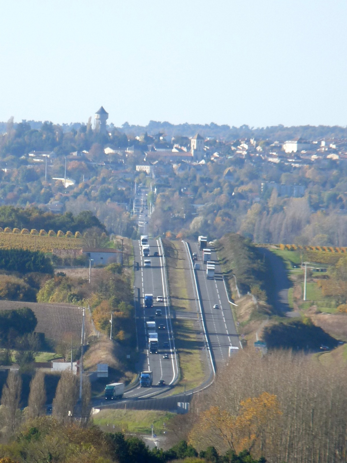 Route nationale 10 et Barbezieux, vue de Nonaville vers le sud, Charente, France